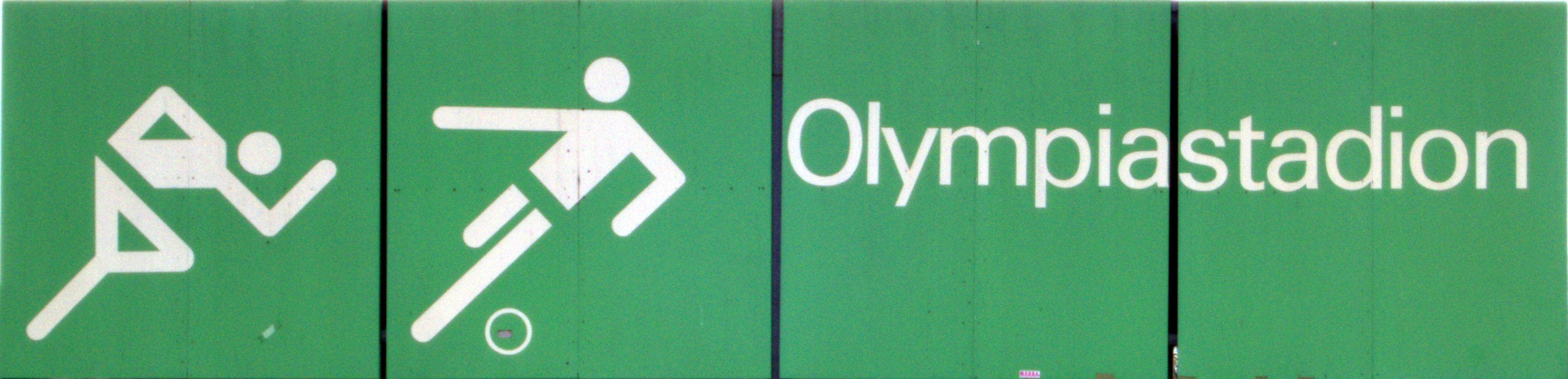 Logo am Olympiastadion in München - Detail